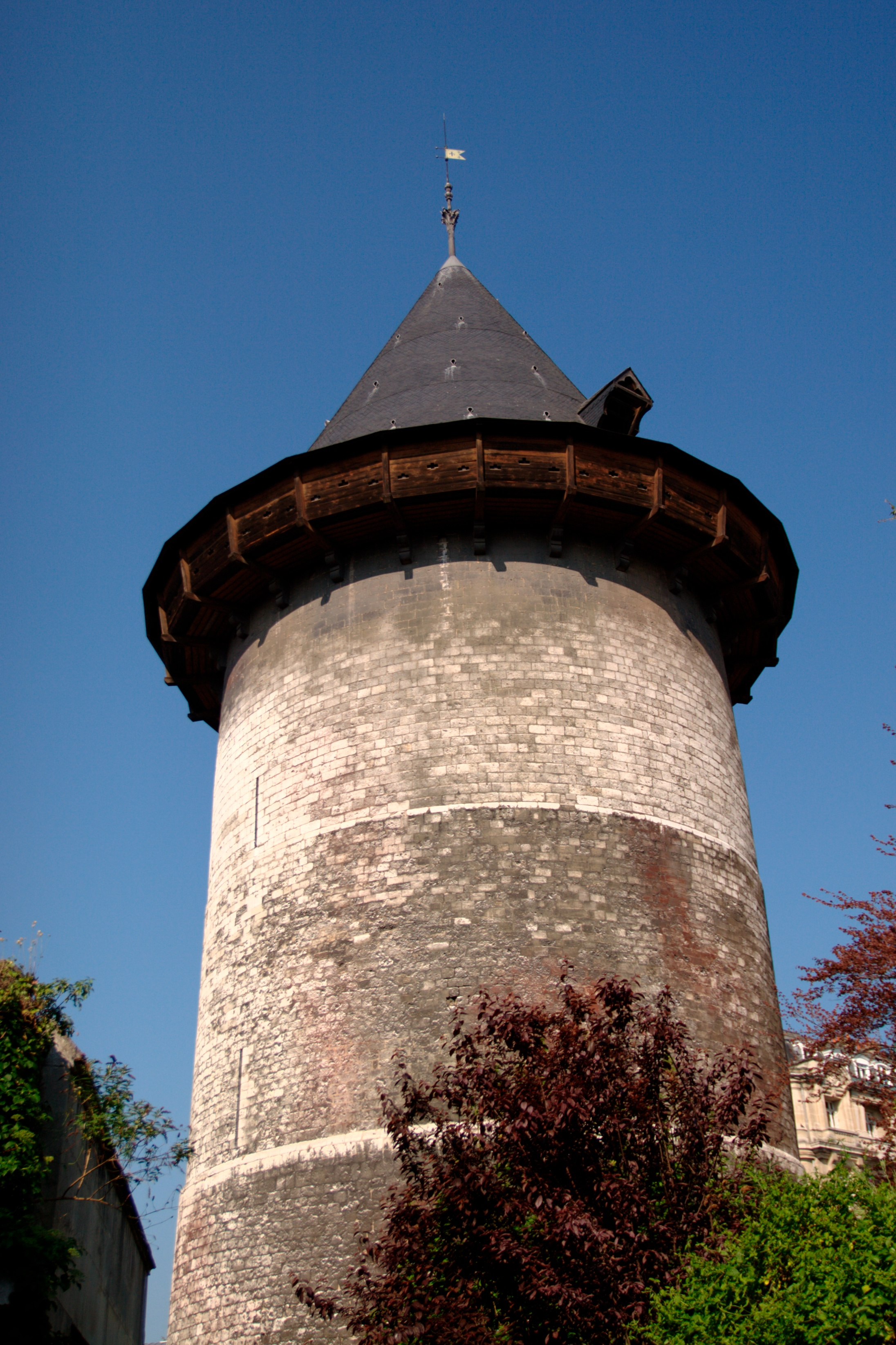 Tour Jeanne d'Arc